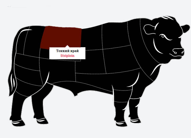 Отруб стриплойн